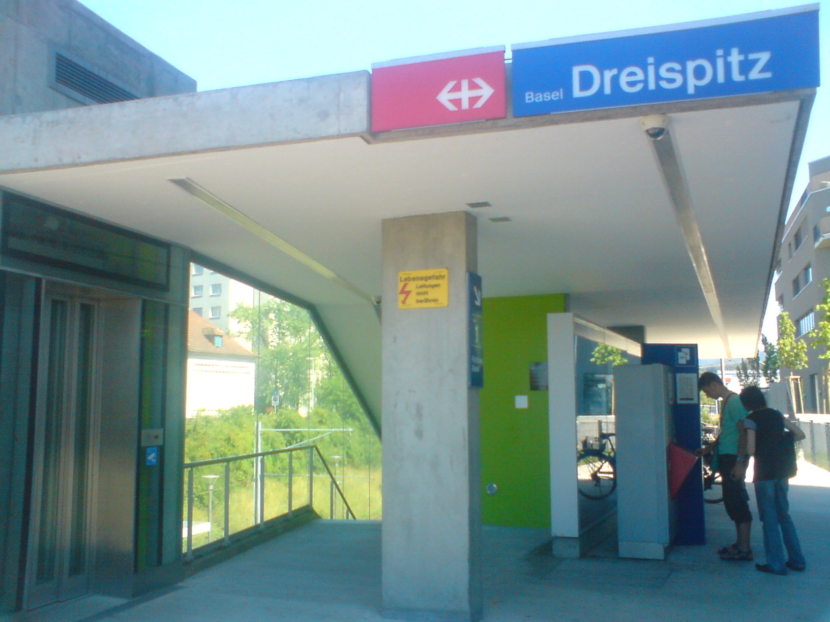 La gare de Bâle-Dreispitz.